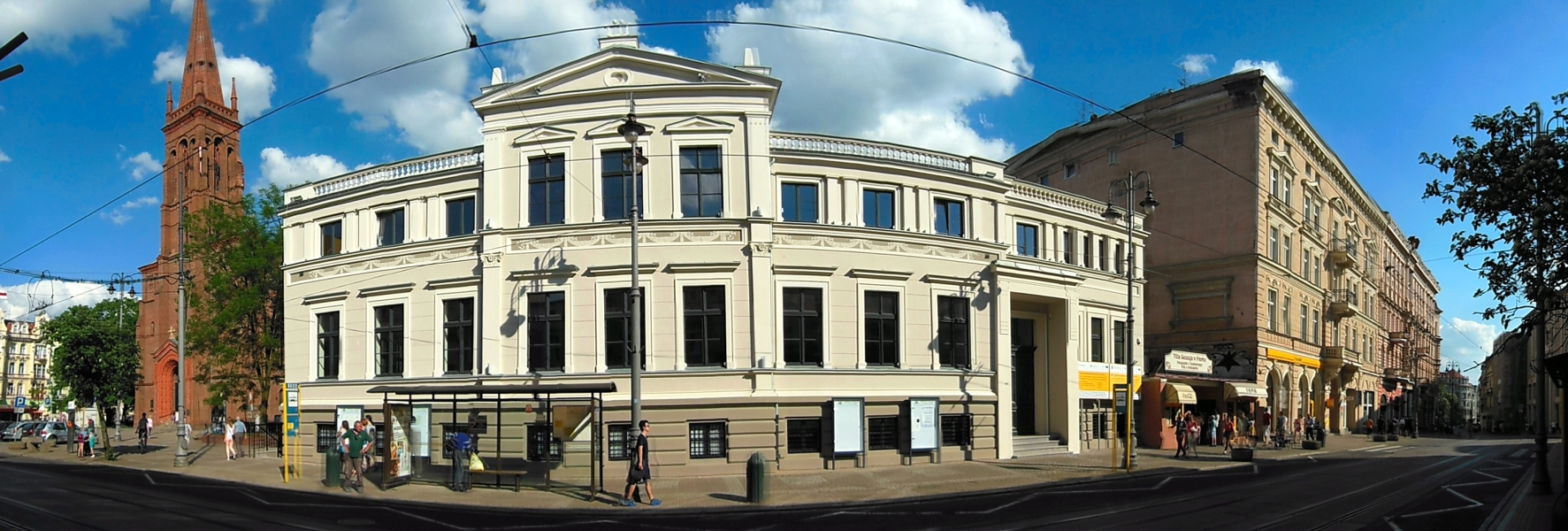 Dawne kasyno cywilne (1887), Pomorski Dom Sztuki, od 2006 r. w gestii Akademii Muzycznej w Bydgoszczy, ul. Gdańska 20